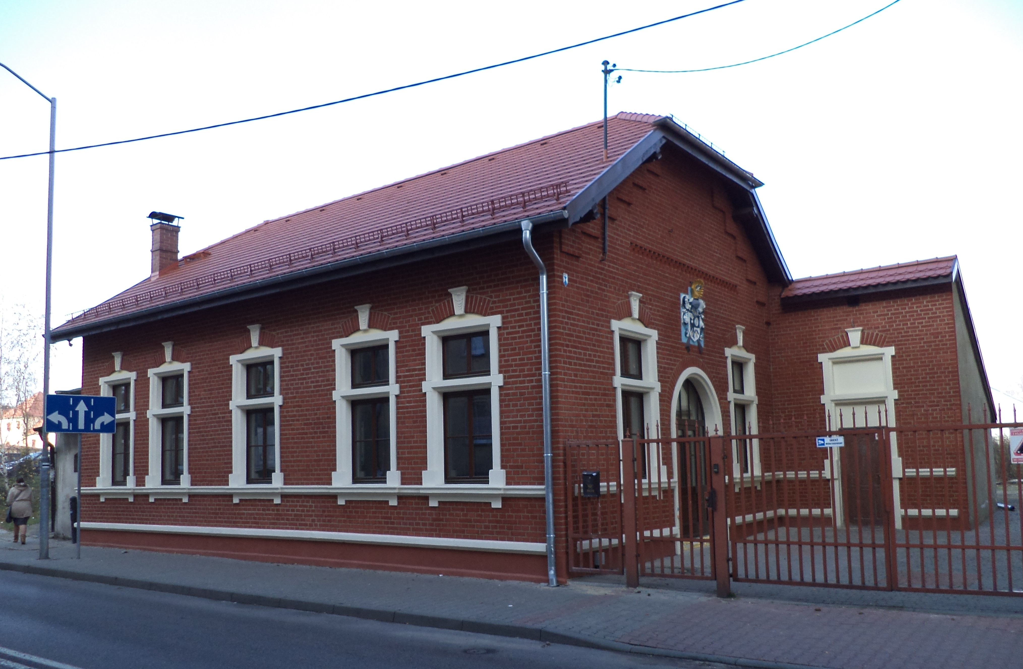 Tarnowskie Góry, ul. T. Kościuszki 5 - budynek strzelnicy brackiej, wzniesiony w latach 1903-1904 (zabytek nr A/116/04), odrestaurowany w 2015